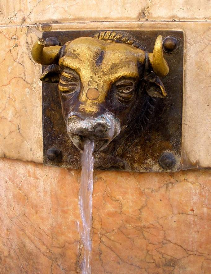 Teruel - Fuente del Torico